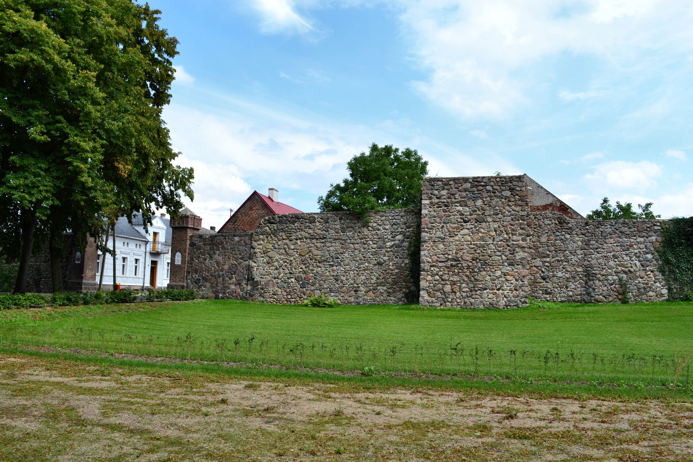 Moryń - obwarowania miejskie